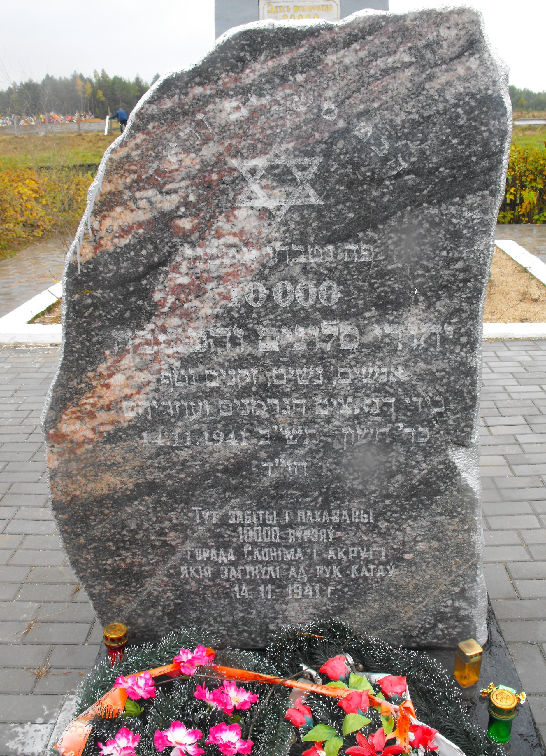 Мемориальный комплекс на одном из мест массовых убийств евреев - узников Слонимского гетто (Гродненская область). На этом месте только 14 ноября 1941 года гитлеровцами и полицаями были убиты и захоронены примерно 10000 евреев Слонима и близлежащих деревень. Расположен на Чепелевских полях - территории, расположенной в 500 метрах слева от трассы Р99 Барановичи-Слоним на 46 километре от Барановичей (не доезжая 1 километра до поворота налево на Чепелево, если двигаться со стороны Барановичей).